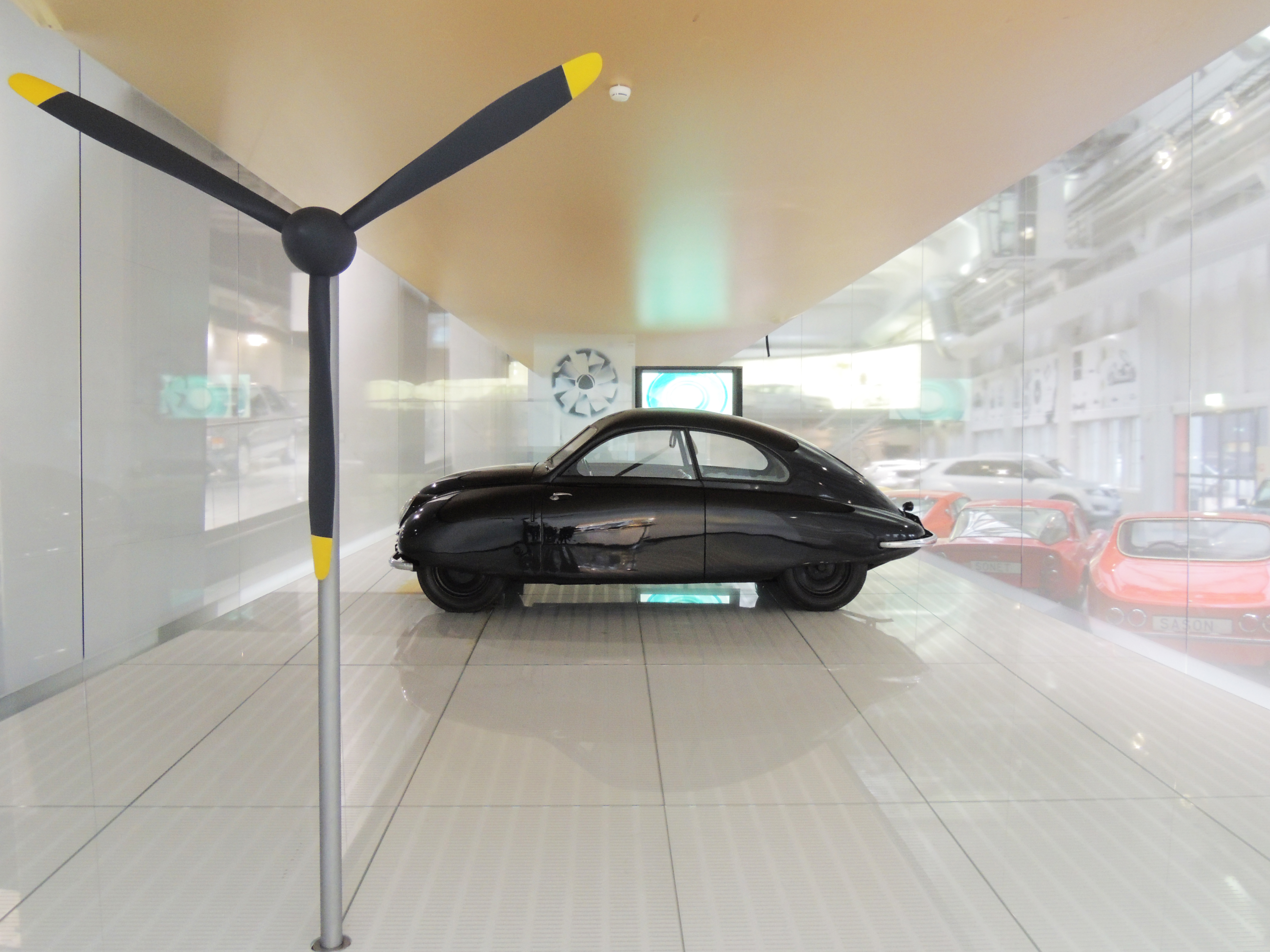 Ursaab